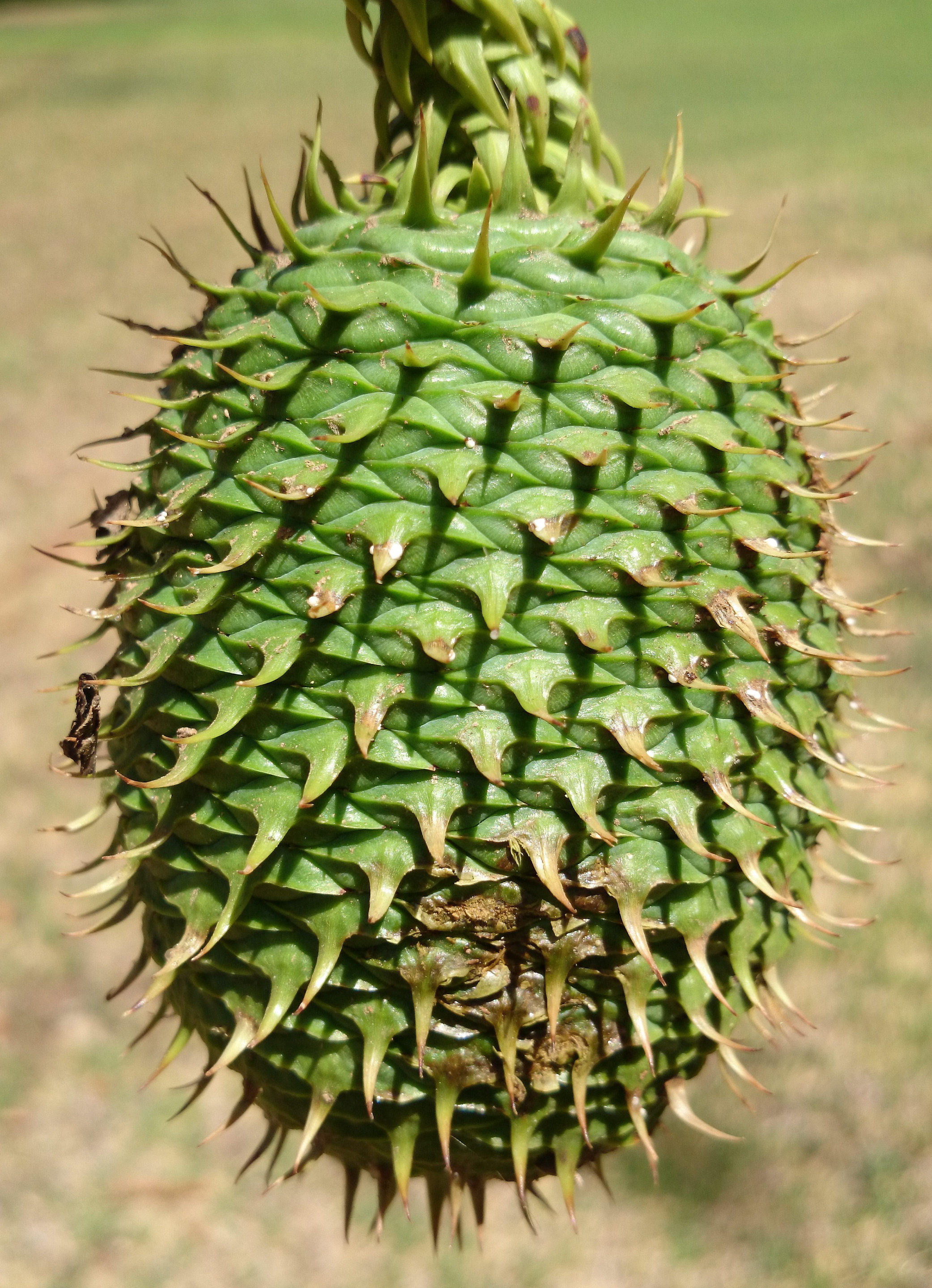 Araucaria cunninghamii cone at Collins Park.